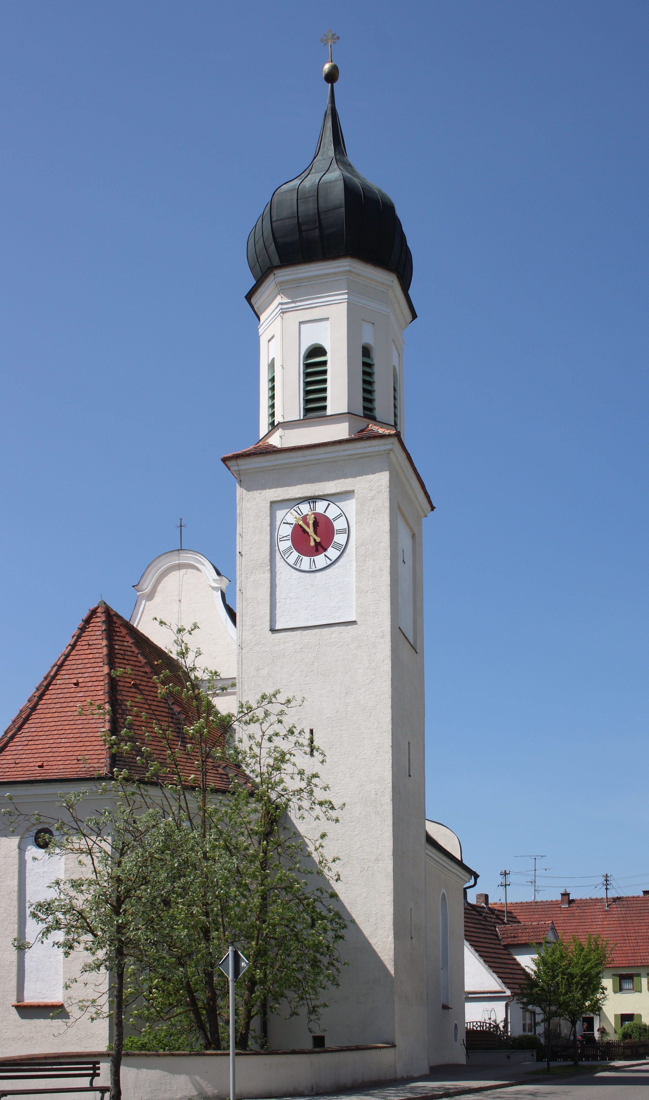 Katholische Pfarrkirche St. Nikolaus in Langenreichen, einem Ortsteil von Meitingen im Landkreis Augsburg (Bayern)